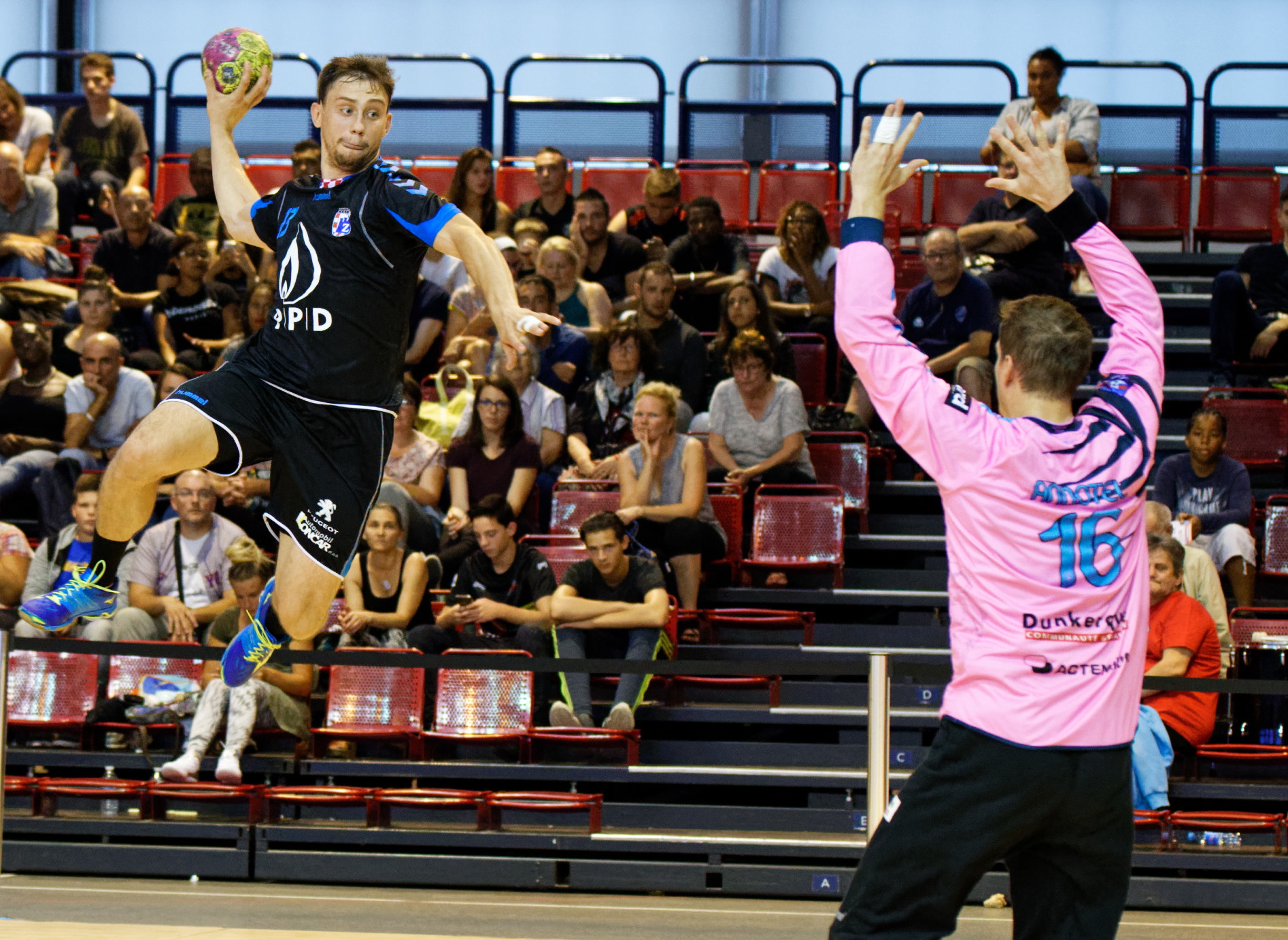 Rencontre du challenge Marrane 2016 entre l'US Dunkerque et les croates du RK Zagreb